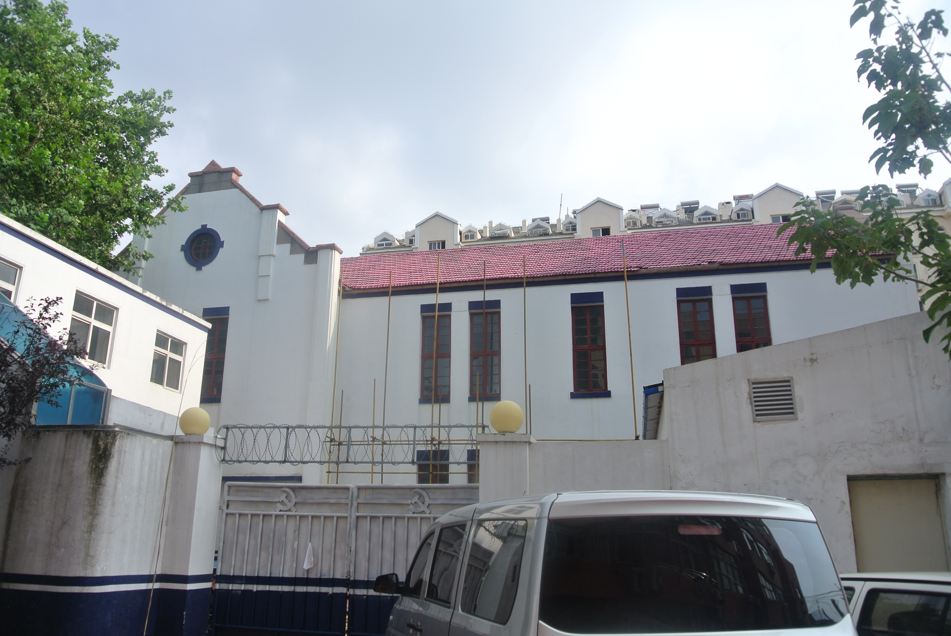 青岛四方日本寻常小学校旧址